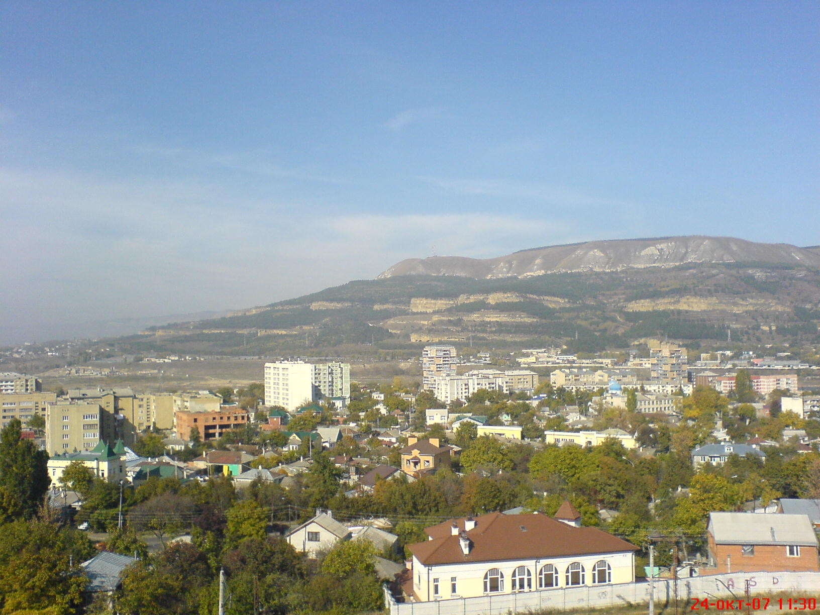 Пастбищный хребет. Вид с из г. Кисловодск (ул. Калинина)